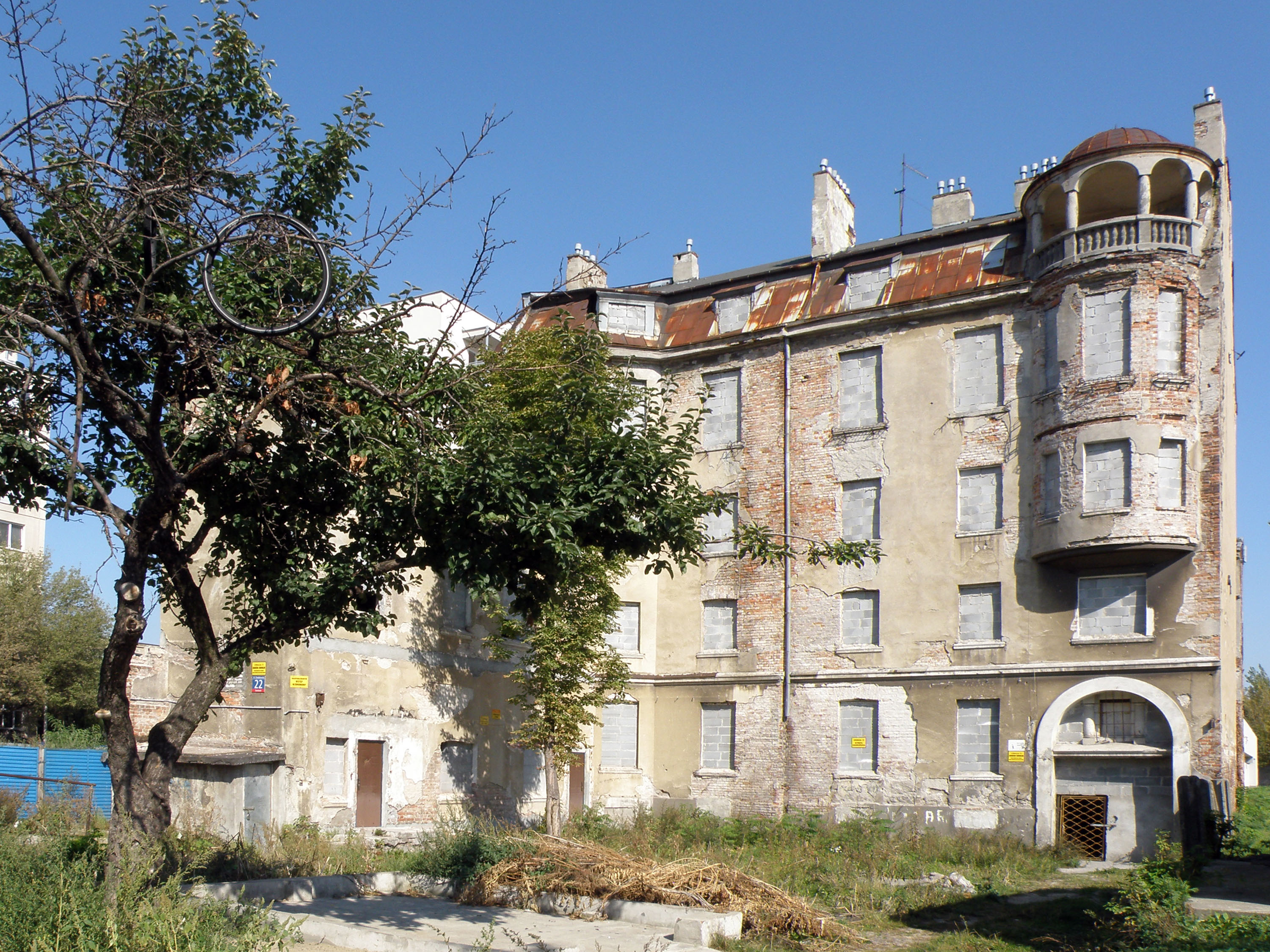 Kamienica z oficynami, 1914, ul. Chodakowska 22 w Warszawie (nr A-718 z 1.08.2006).